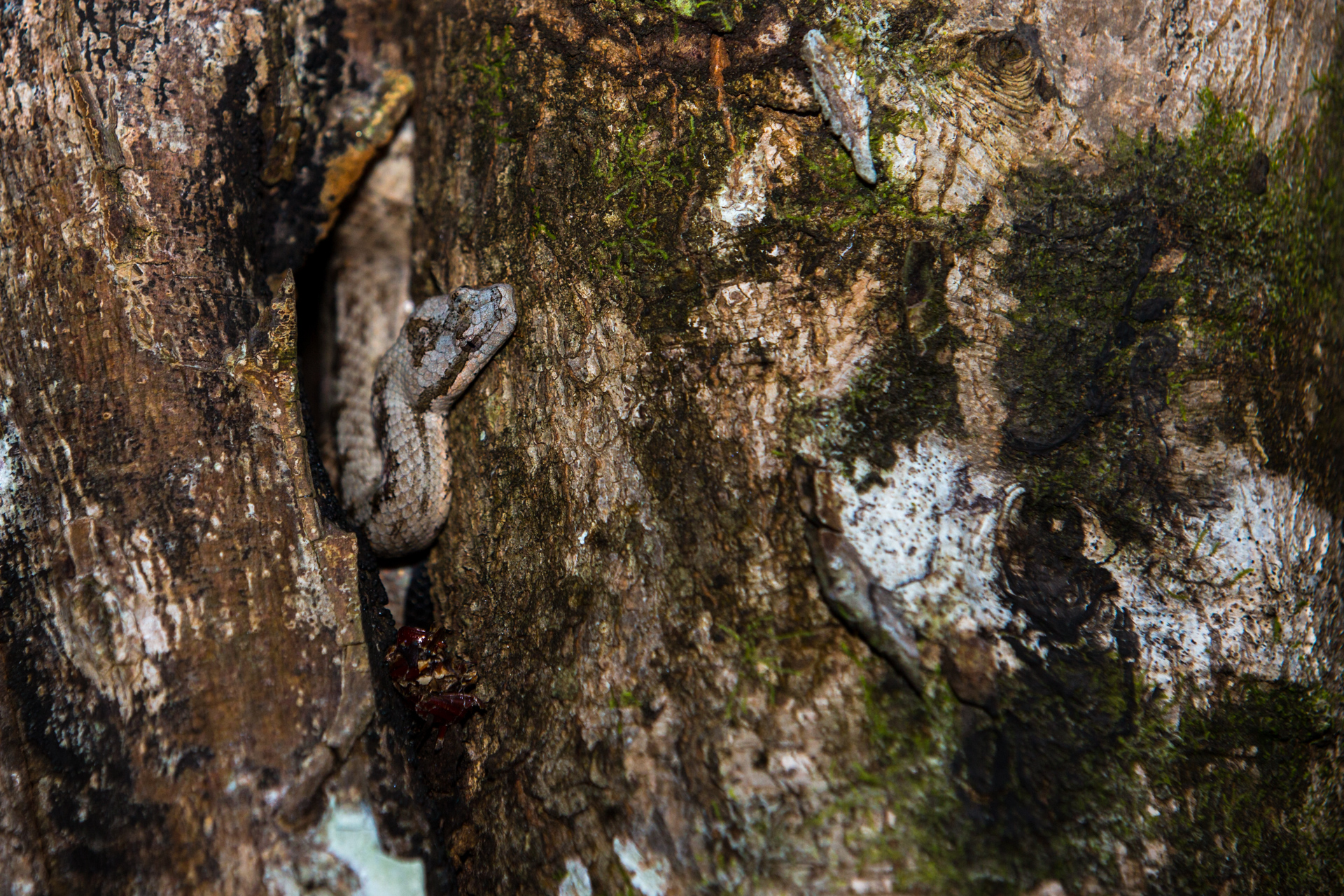 Este individuo fue hallado en una zona tupida de la parte sur de Bermejas, municipio Ciénaga de Zapata.